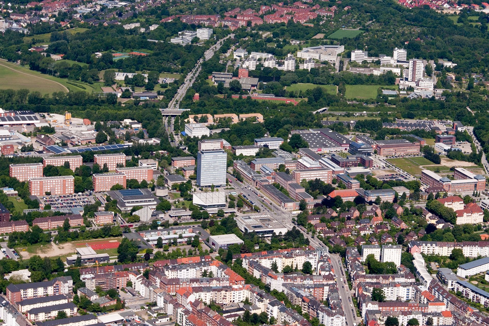 Luftaufnahme des Campus der Christian-Albrechts-Universität zu Kiel